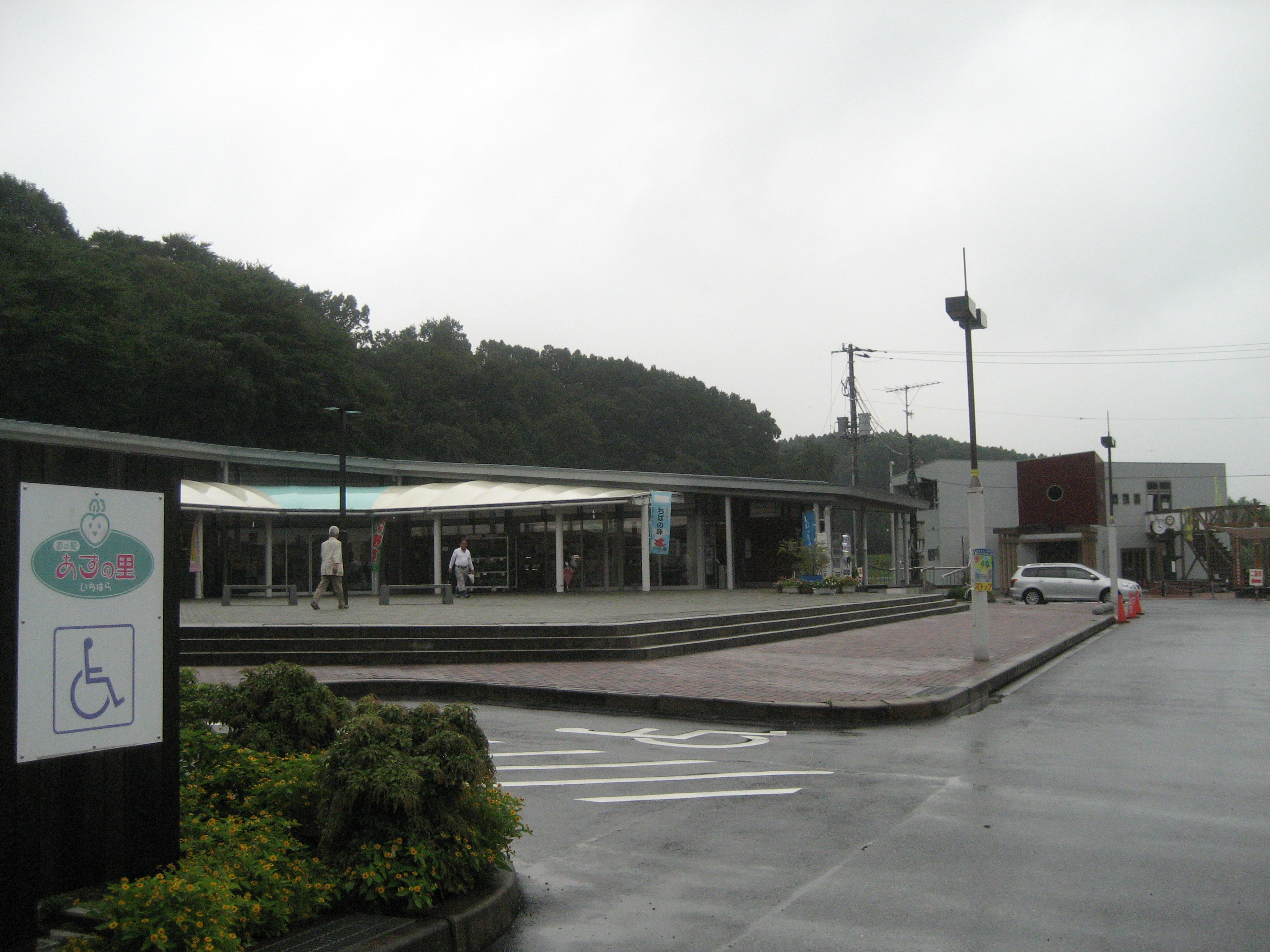 道の駅あずの里市原（千葉県市原市）